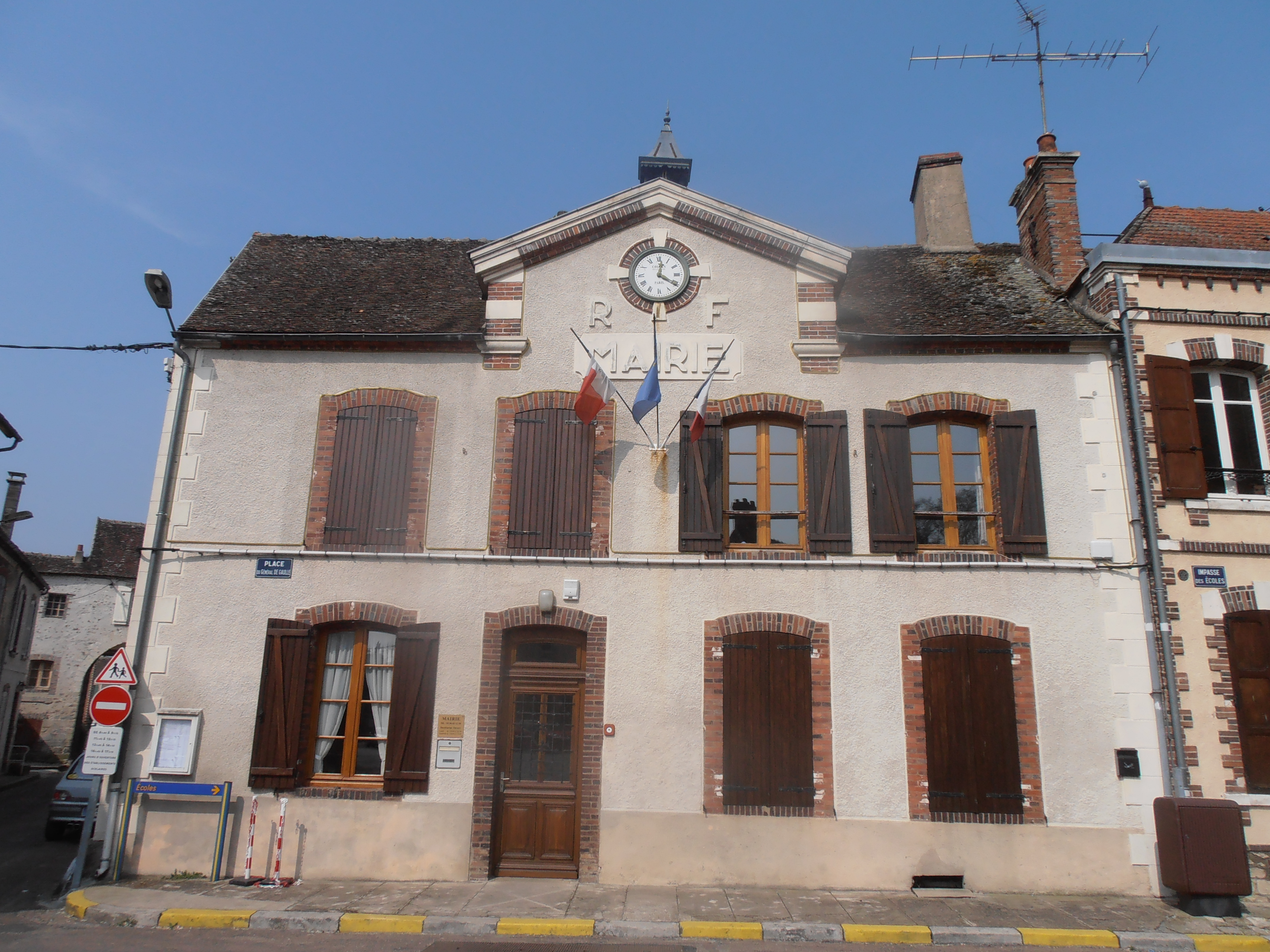 Mairie de Cezy (Yonne) France